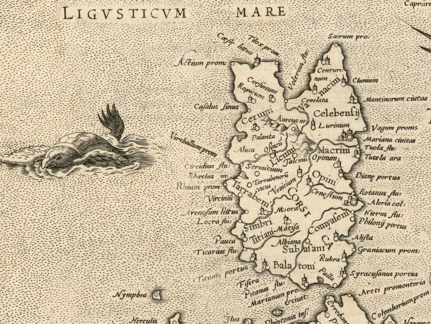 Extrait de la carte Corse (possession romaine) Auteur : Ptolémée, Claude (0100?-0170?). Auteur adapté Légendes:Eur. VI tab. : Continet Italiam & Cyrnum sive Corsicam insulam / [Mercator d'après Ptolémée]